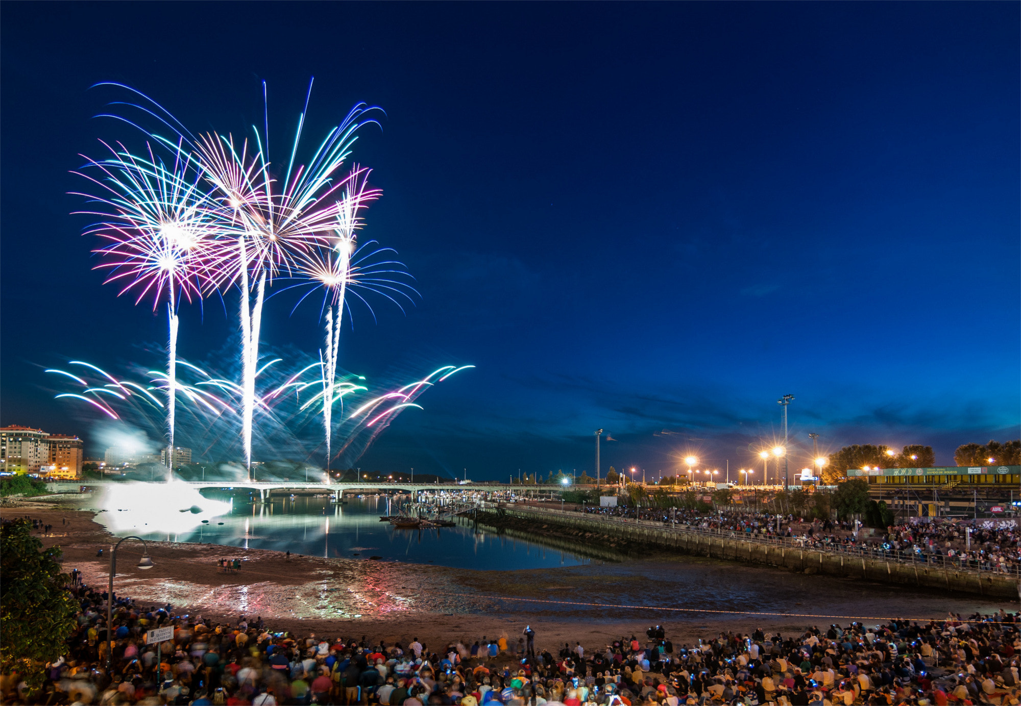 500px provided description: Imagen tomada durante la celebraci?n de las fiestas de Bouzas del a?o 2013, en Vigo, Galicia. [#Bouzas ,#Beach ,#Night ,#Sea ,#Galicia ,#Playa ,#Nocturna ,#Noche ,#Vigo ,#Fireworks ,#Mar ,#Fiesta ,#Fair ,#Fiestas ,#Fuegos Artificiales]